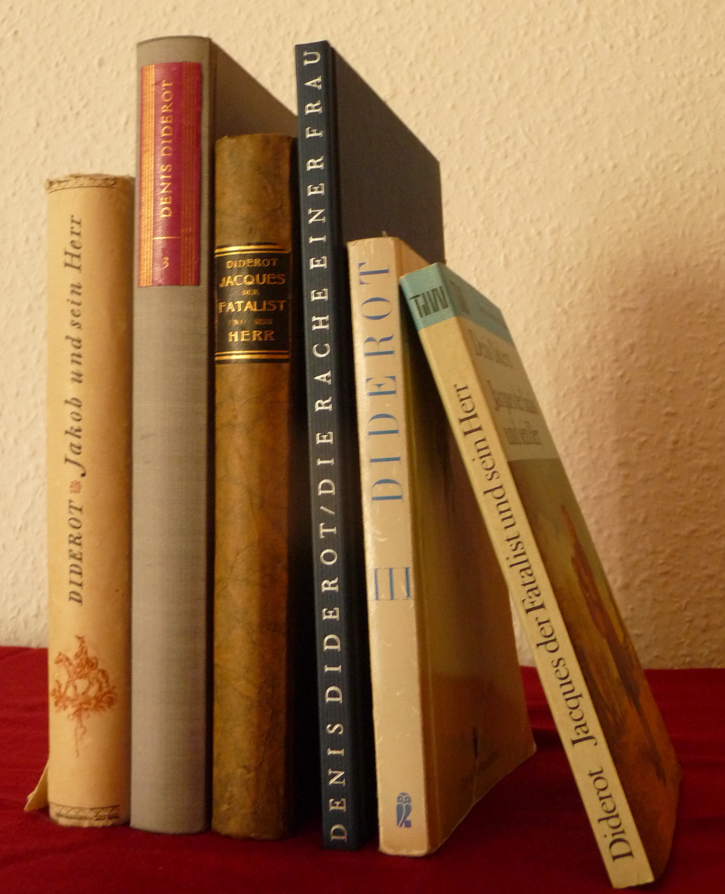 Diderot: Jacques le fataliste et son maitre. German translations